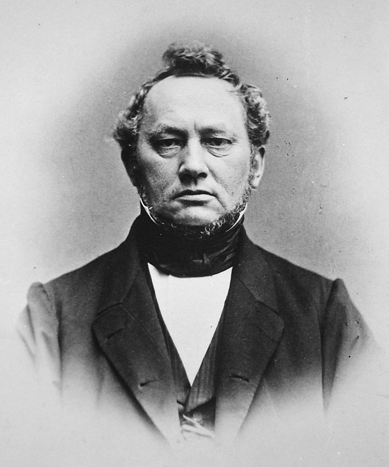 Dr. Theodor Rumpel († 10. April 1885), Direktor des Evangelisch Stiftischen Gymnasiums in Gütersloh von 1851 bis 1868